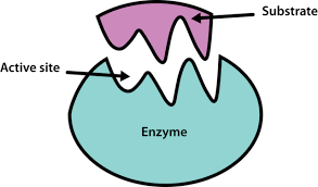 उत्प्रेरक वर्गीकरण